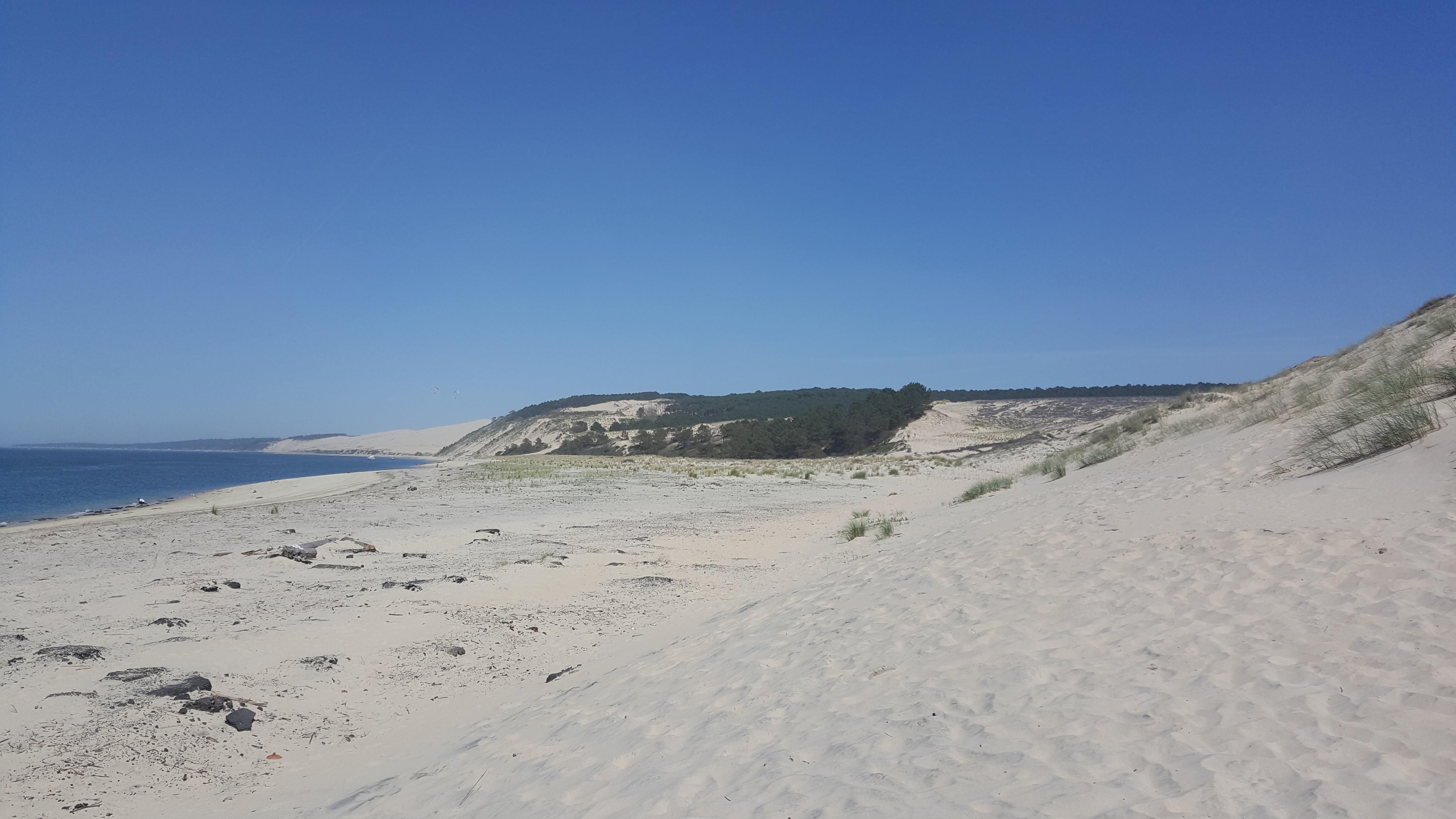 La plage de la Dune du Pyla.